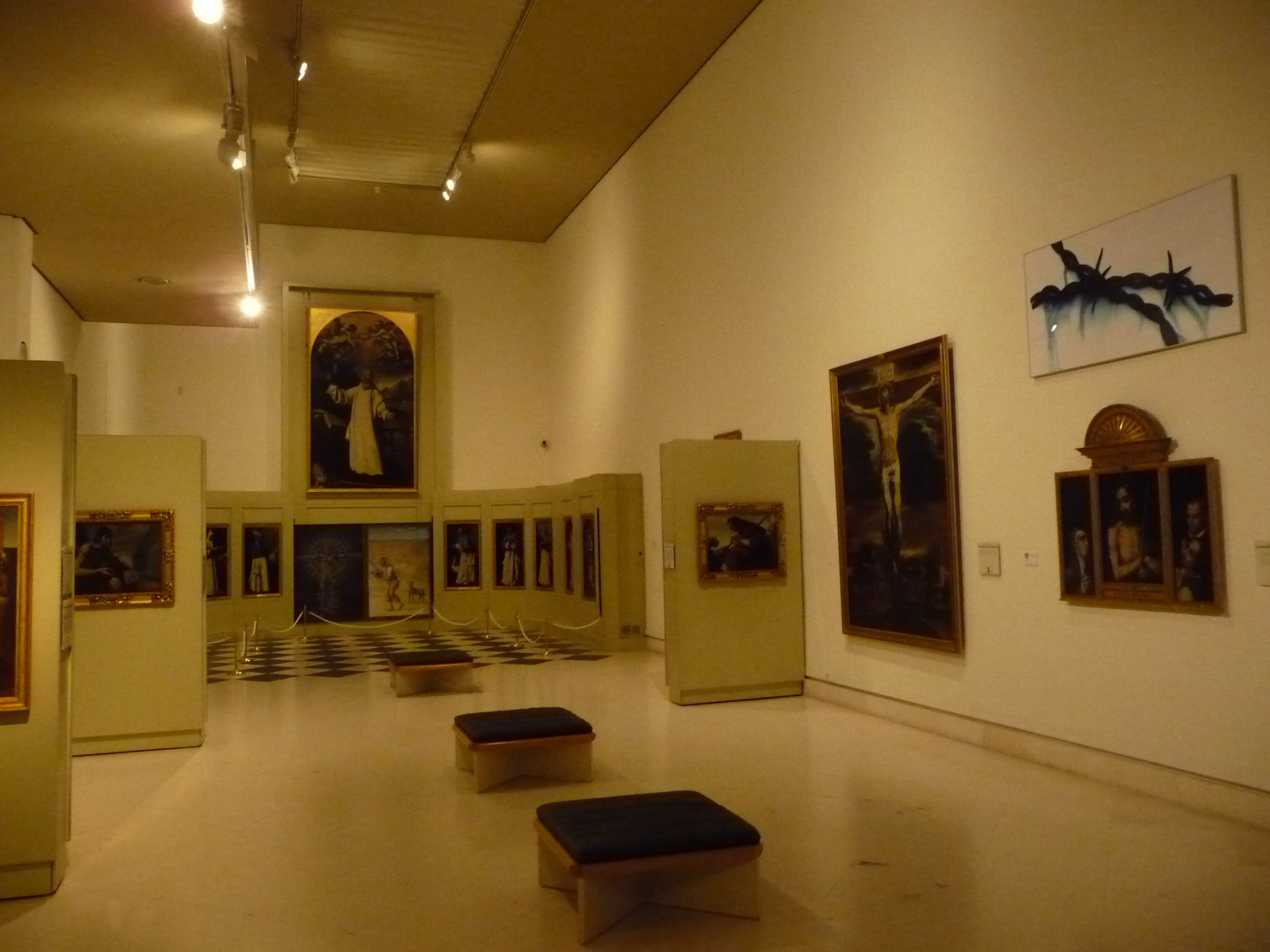 MuseoArqueologicoCadiz-P1050202.JPG